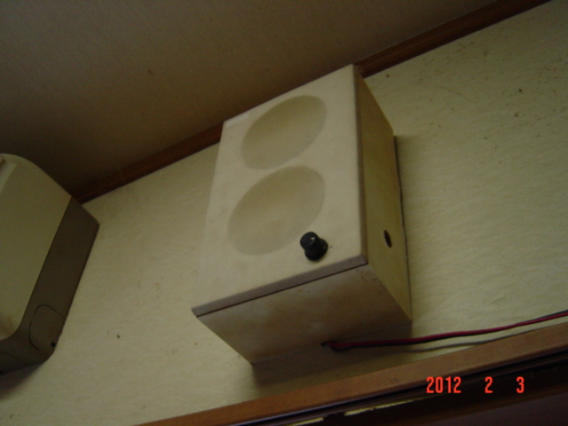 岩崎通信機製スピーカ（写真ではＩＰ告知端末外部スピーカとして使用している)